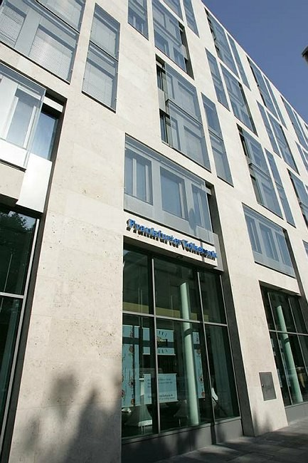 Fassade Frankfurter Volksbank